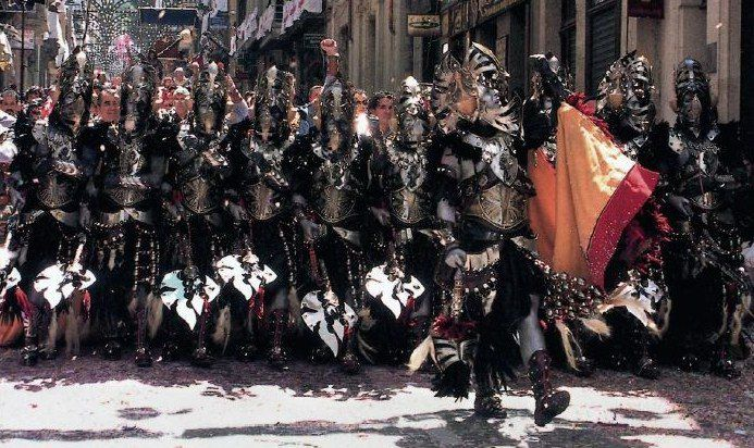 escuadra de negros capitan 2004